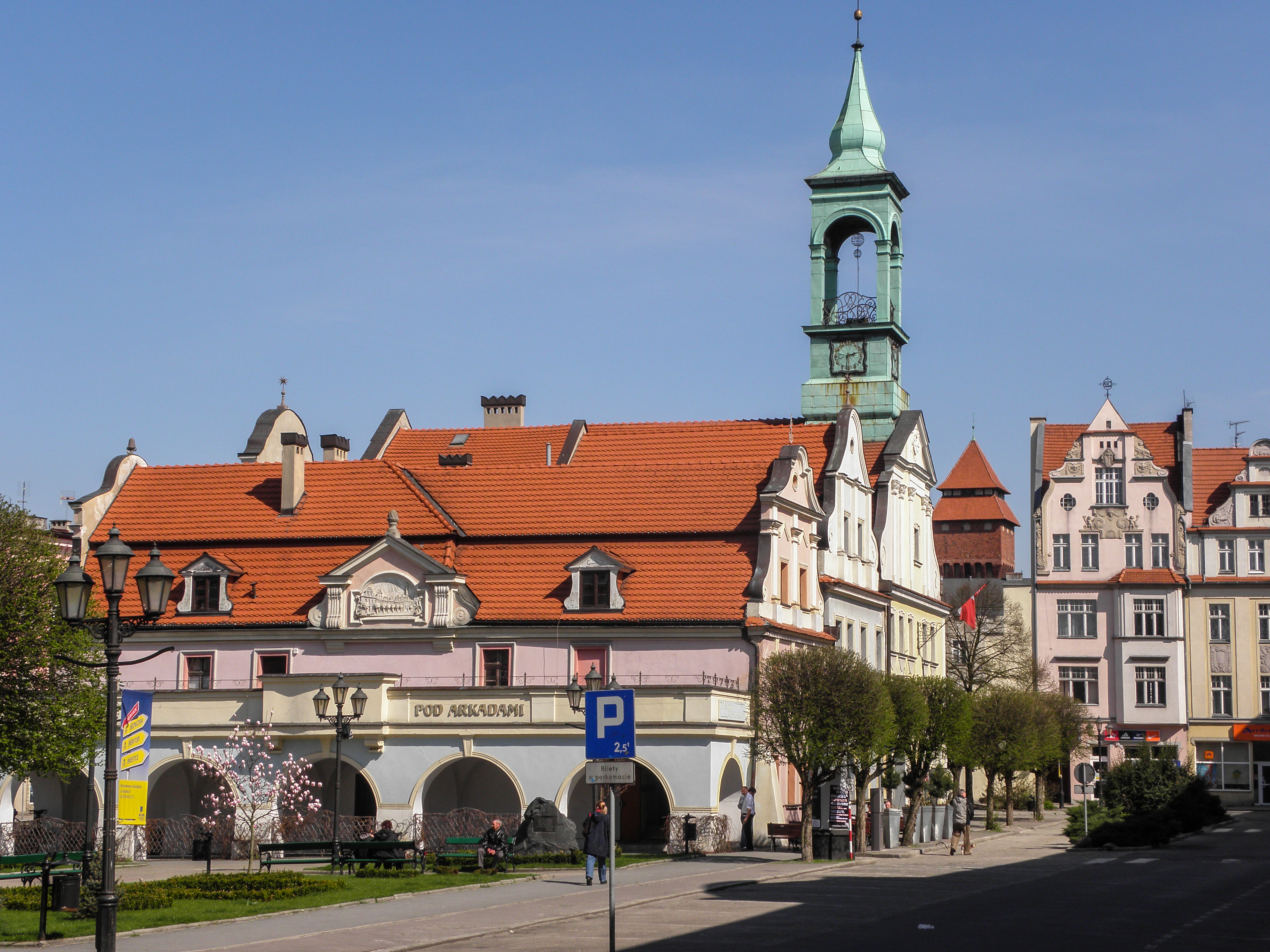 Kluczbork, zespół ratusza